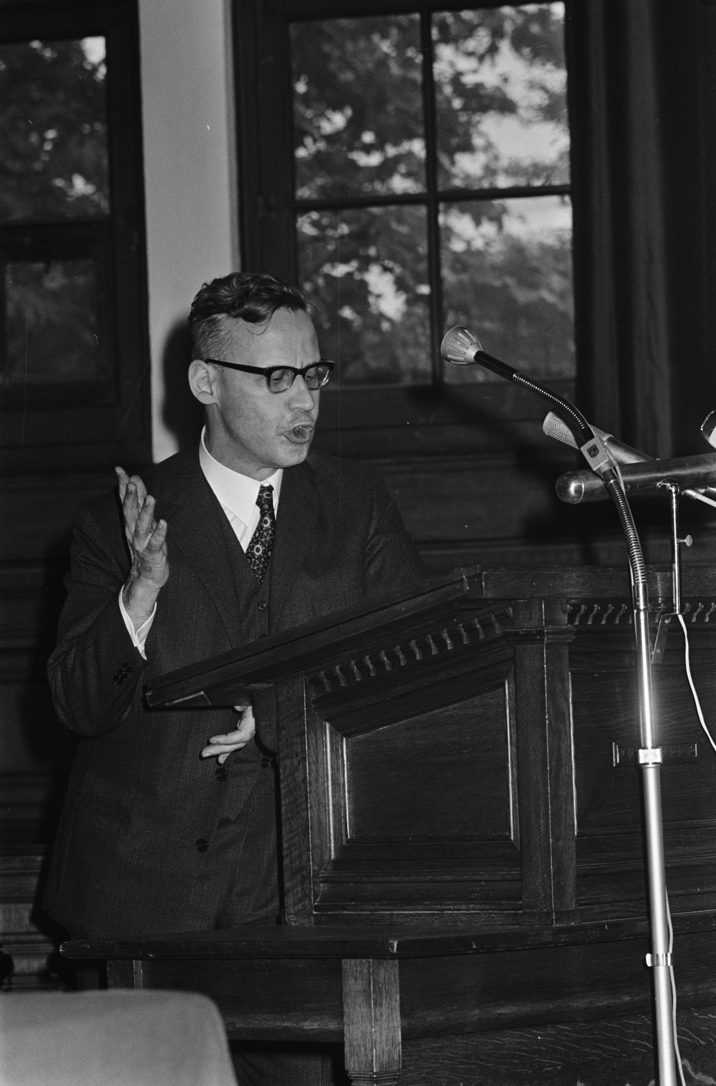 Collectie / Archief : Fotocollectie Anefo Reportage / Serie : Zeventiende Lustrum van de Vrije Universiteit in Amsterdam Beschrijving : Minister Diepenhorst tijdens een redevoering Datum : 15 oktober 1965 Locatie : Amsterdam, Noord-Holland Trefwoorden : jubilea, ministers, toespraken, universiteiten Persoonsnaam : Diepenhorst, Isäac Fotograaf : Fotograaf Onbekend / Anefo Auteursrechthebbende : Nationaal Archief Materiaalsoort : Negatief (zwart/wit) Nummer archiefinventaris : bekijk toegang 2.24.01.05 Bestanddeelnummer : 918-3179